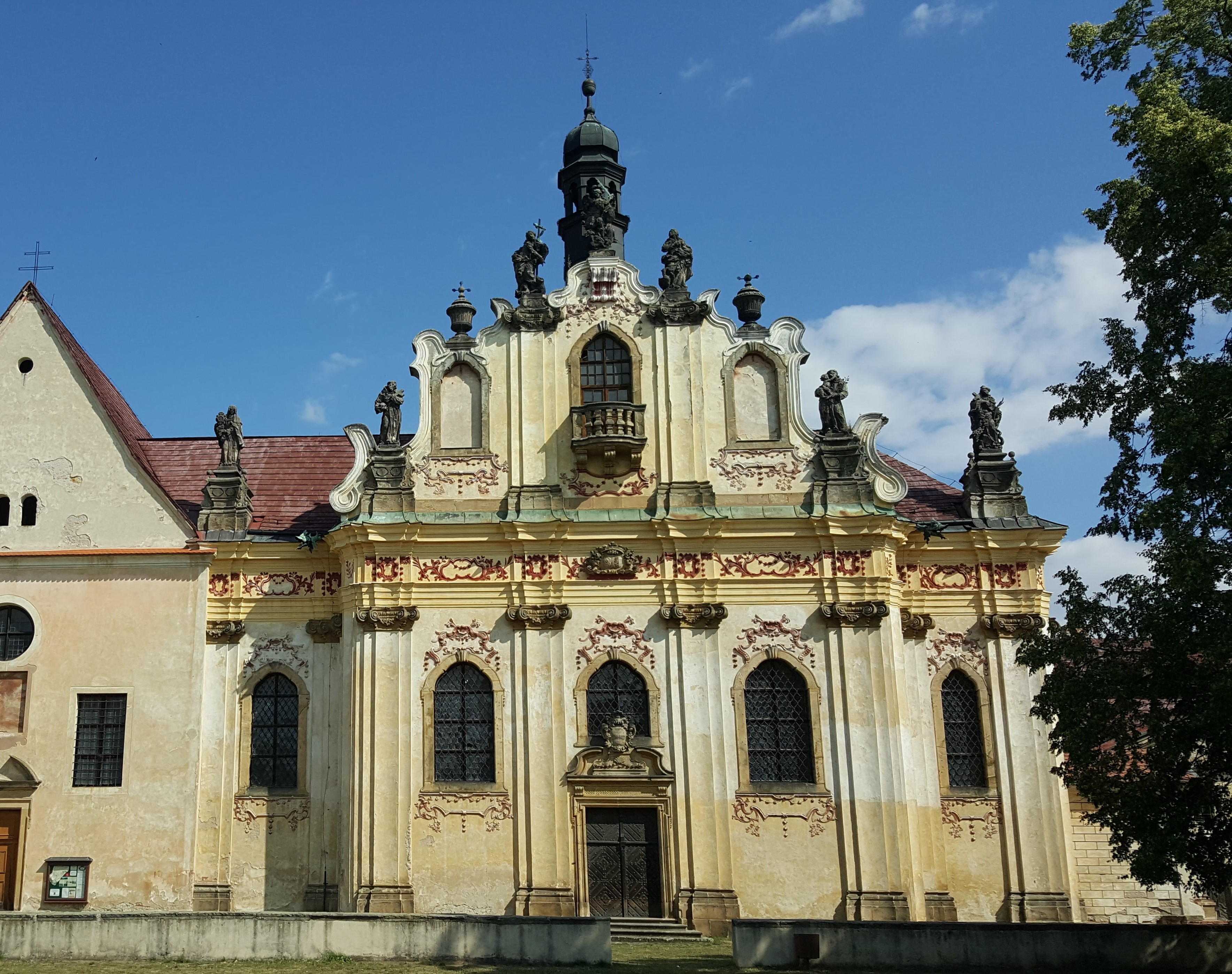 Valdštejnská rodová kaple svaté Anny, Mnichovo Hradiště